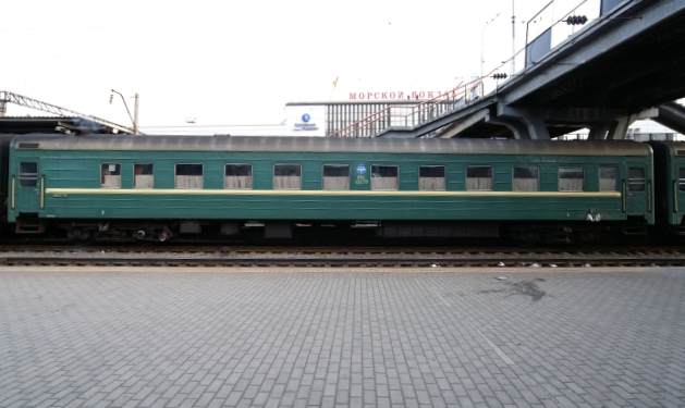 シベリア鉄道で最も典型的な二等寝台客車 Siberië spoor voor personen en auto.